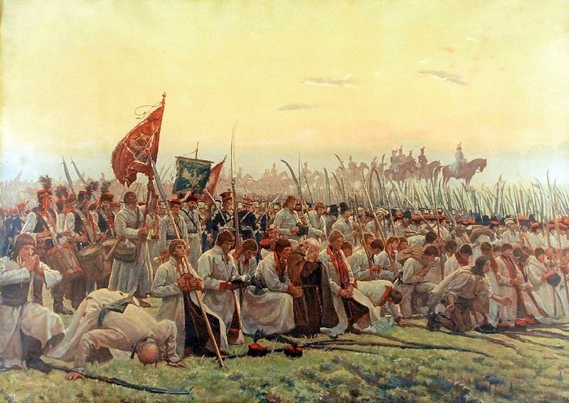 Modlitwa przed bitwą (Racławice)